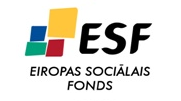 Eiropas Sociālā fonda (ESF) zīmols